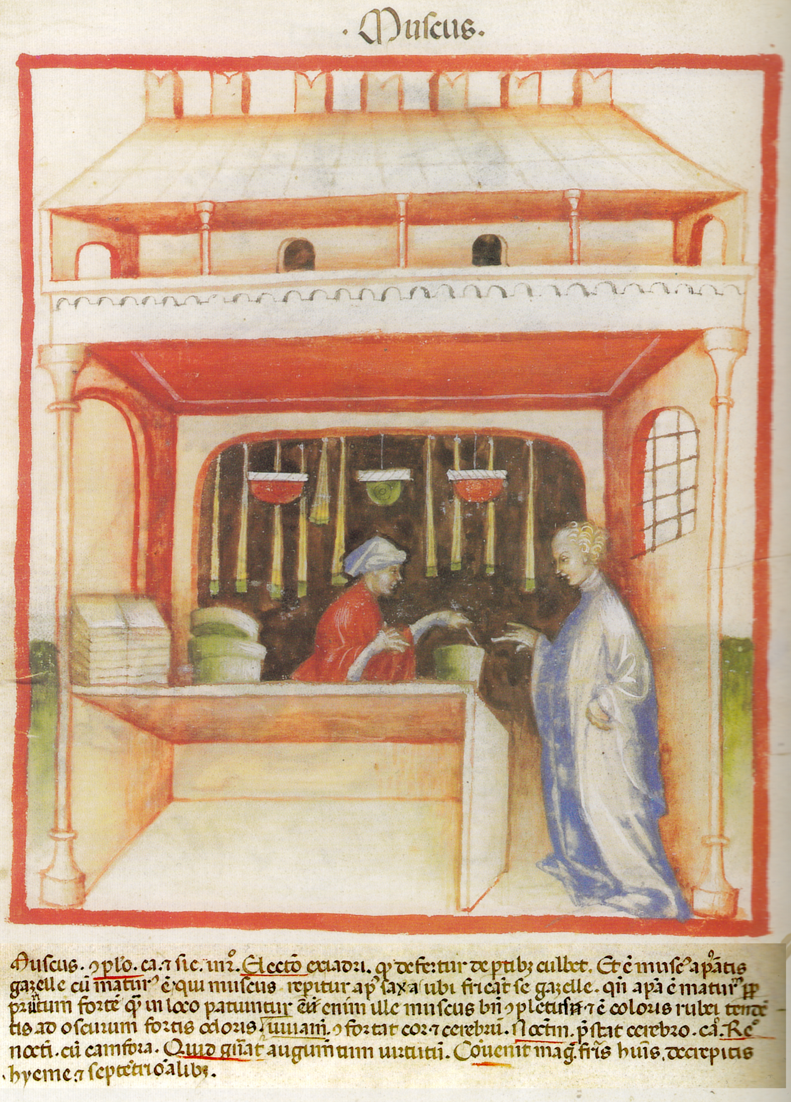 Abbildung und Text zum Kapitel Muscus im Wiener Tacuinum sanitatis (Hs. 2644) auf Blatt 93 verso